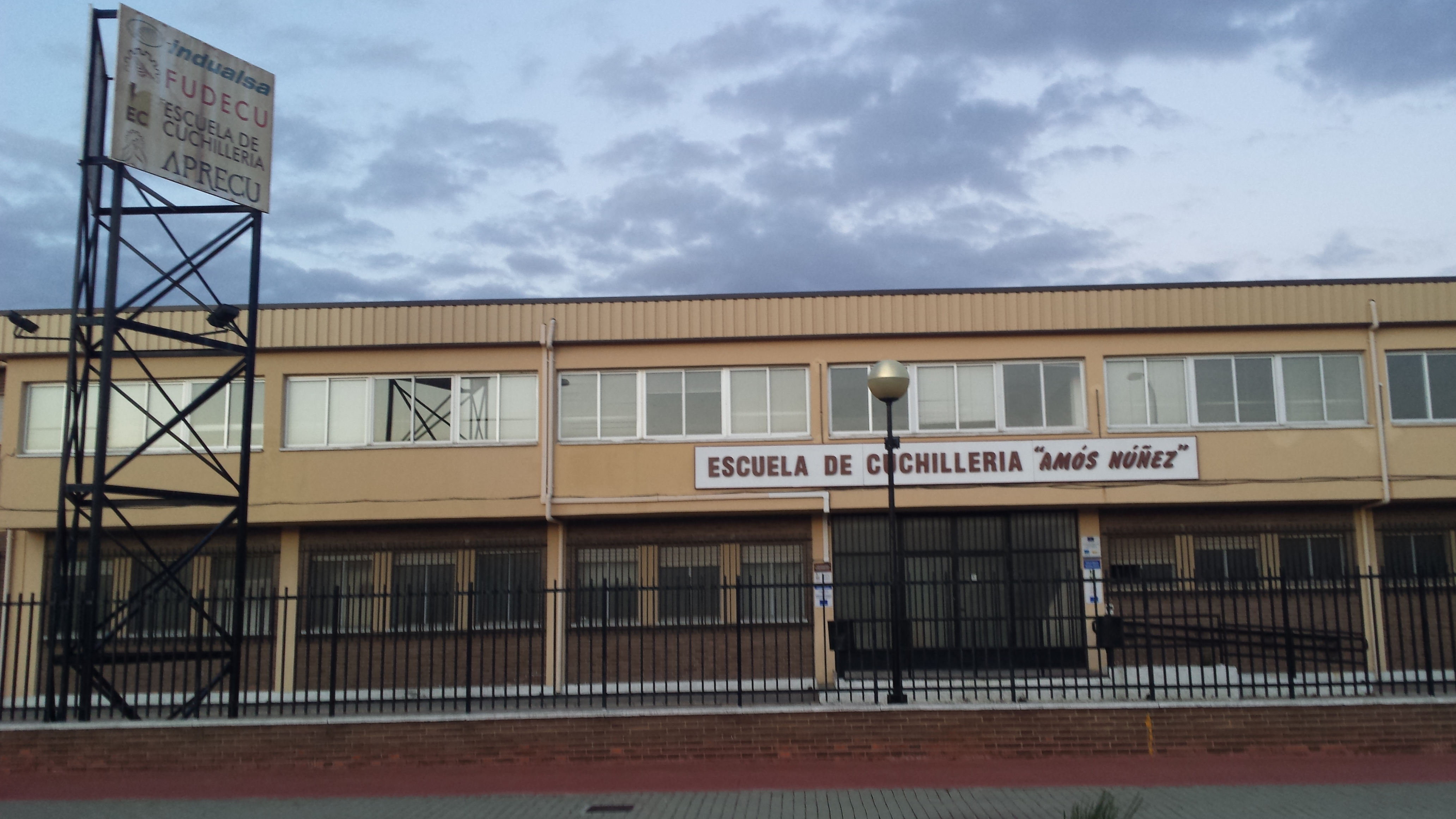 Puerta de entrada a la Escuela de Cuchillería de Albacete Amós Núñez